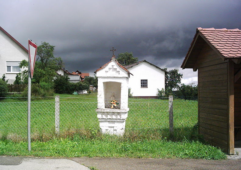 Bildstock in Edelbeuren bei Erolzheim